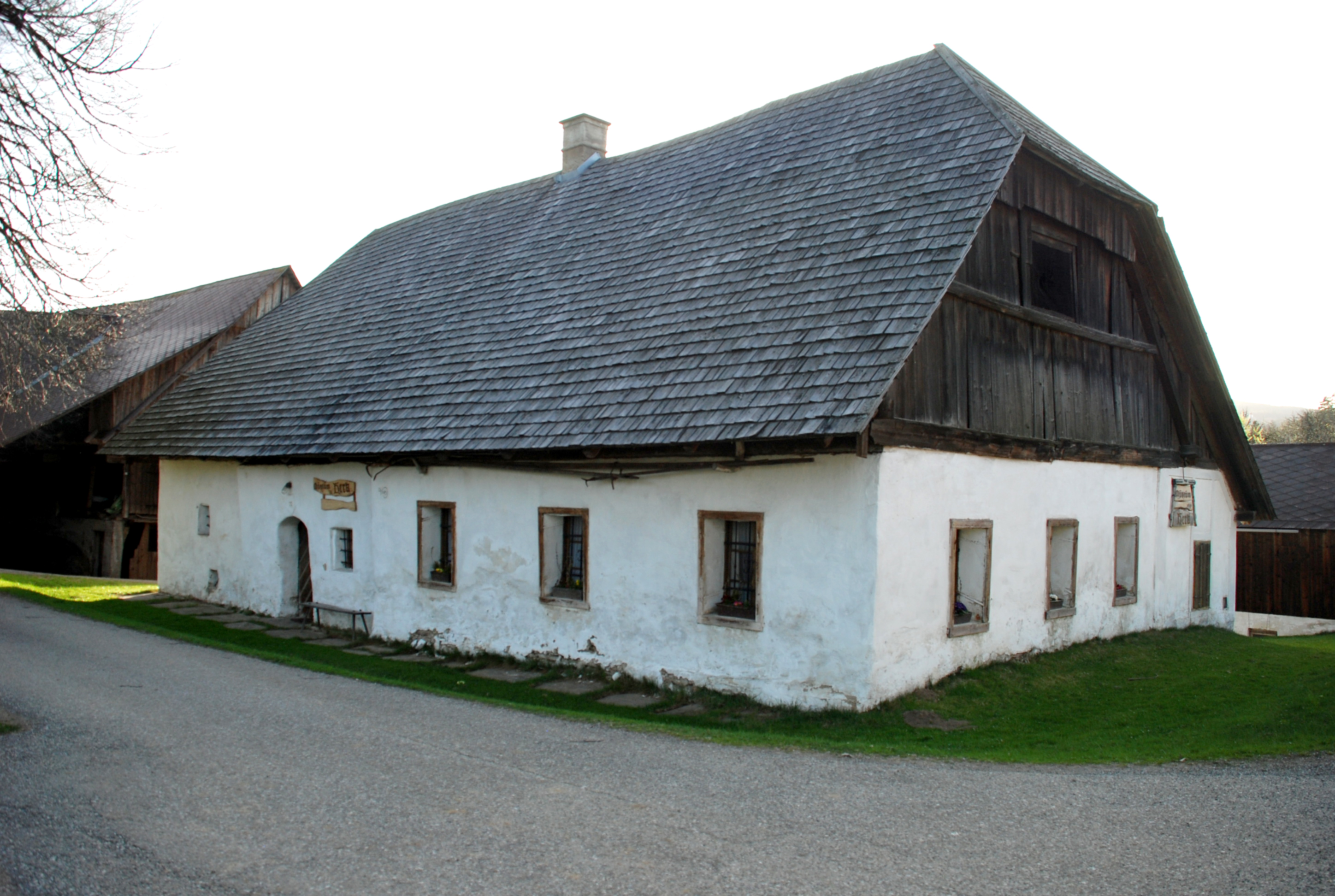 Freiland bei Deutschlandsberg, Bauernhof vulgo Herk, Bauernmuseum